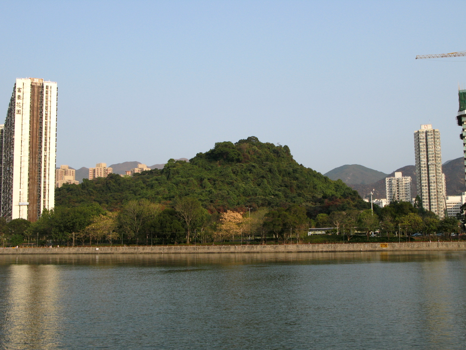 HK Yuen Chau Kok Shing Mun River